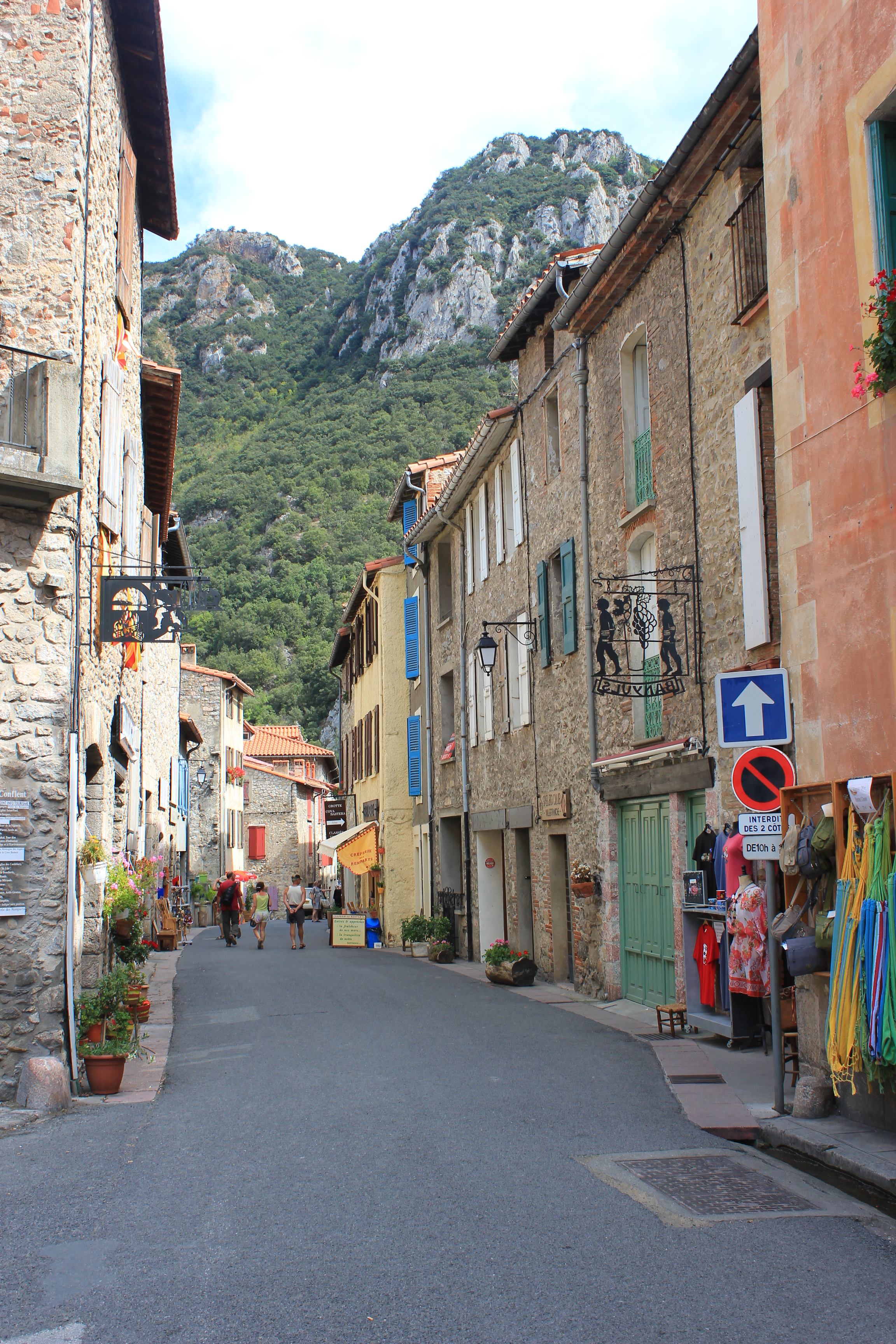 Villefranche-de-Conflent (Pyrénées-Orientales, Languedoc-Roussillon; France) En ville